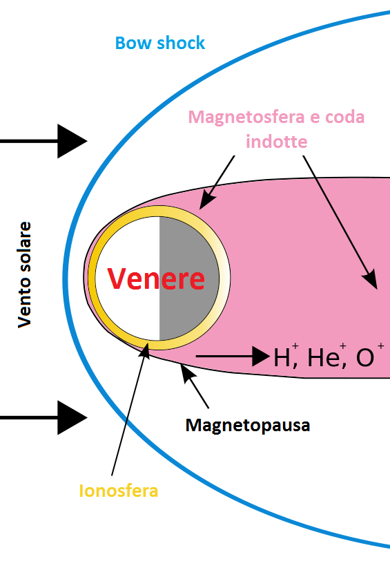 Schema della magnetosfera venusiana. Derivato da: Venusian_magnetosphere.svg